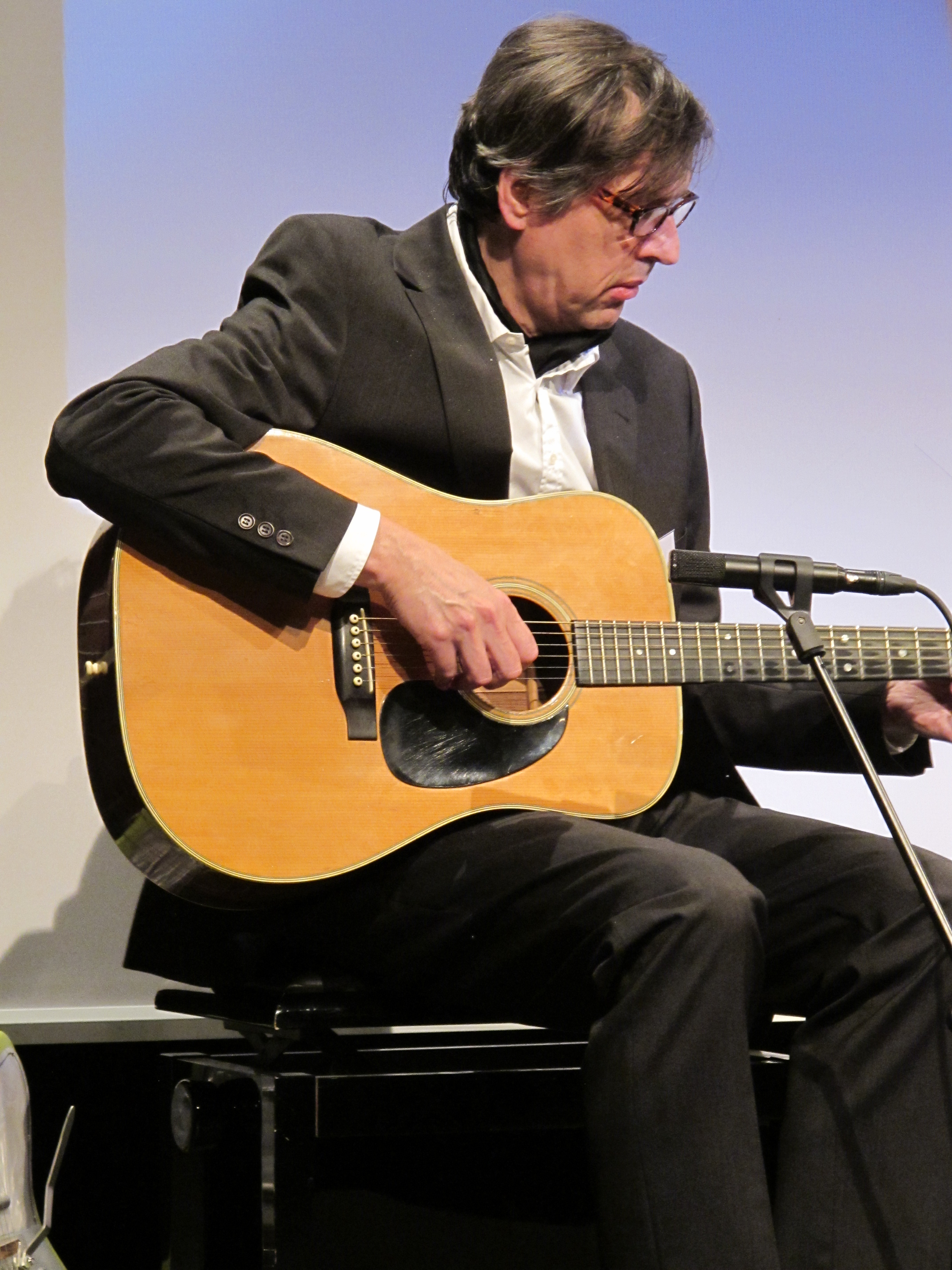 Schamrock Festival 2014 Kalle Laar